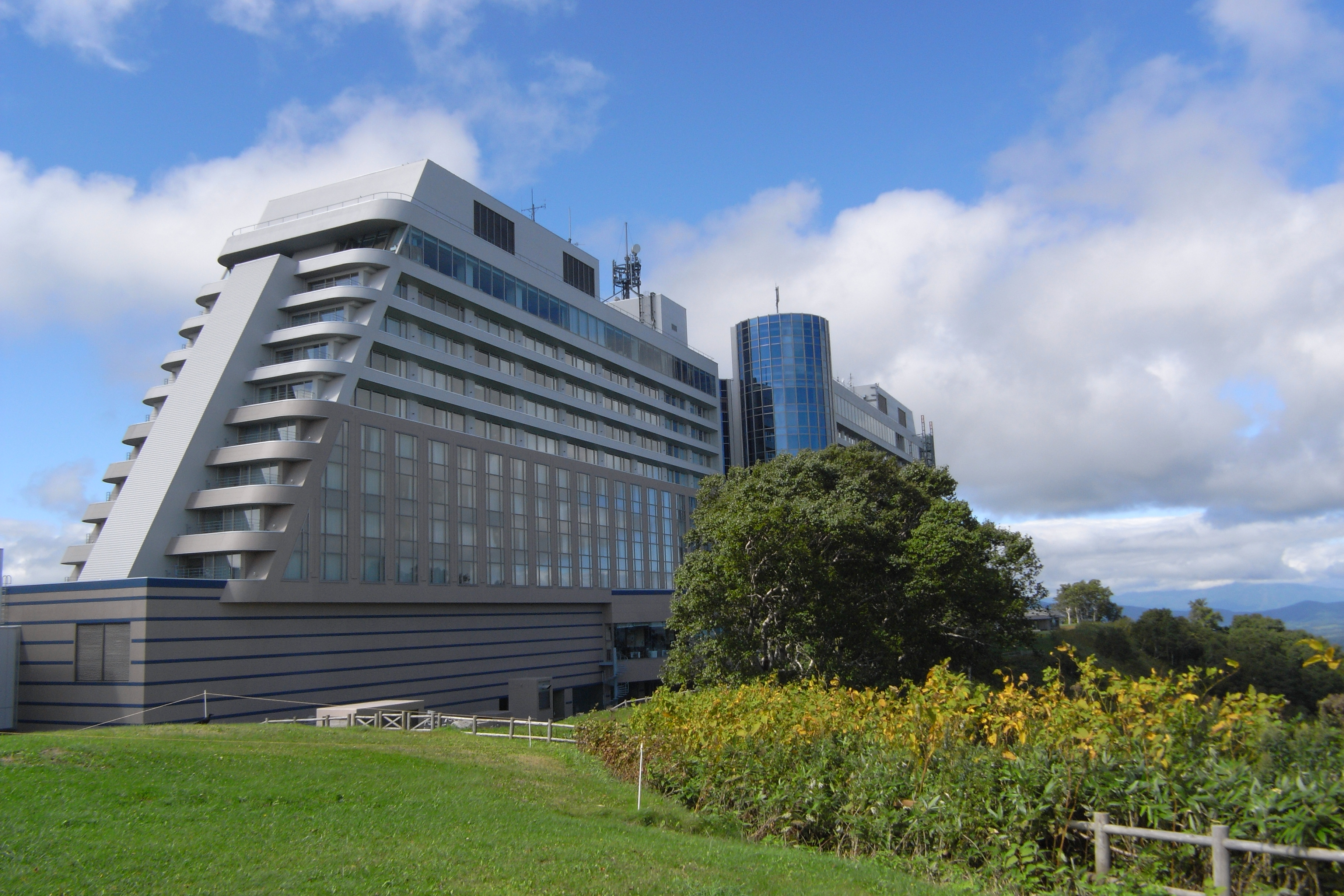 HUGE!